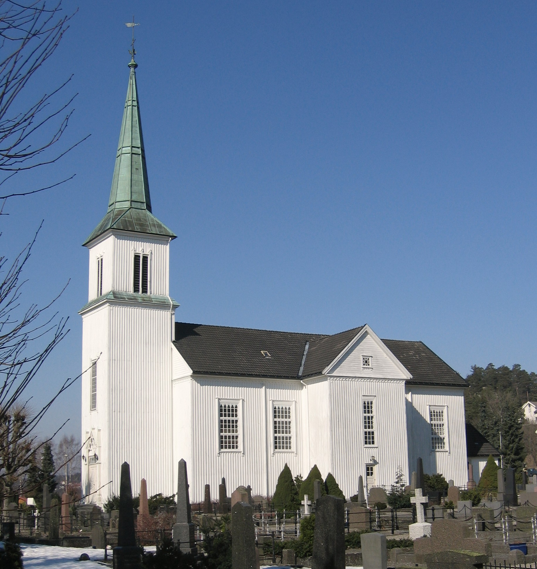 Hisøy kirke i Arendal. 2007. Arkitekt Gustav Adolph Lammers